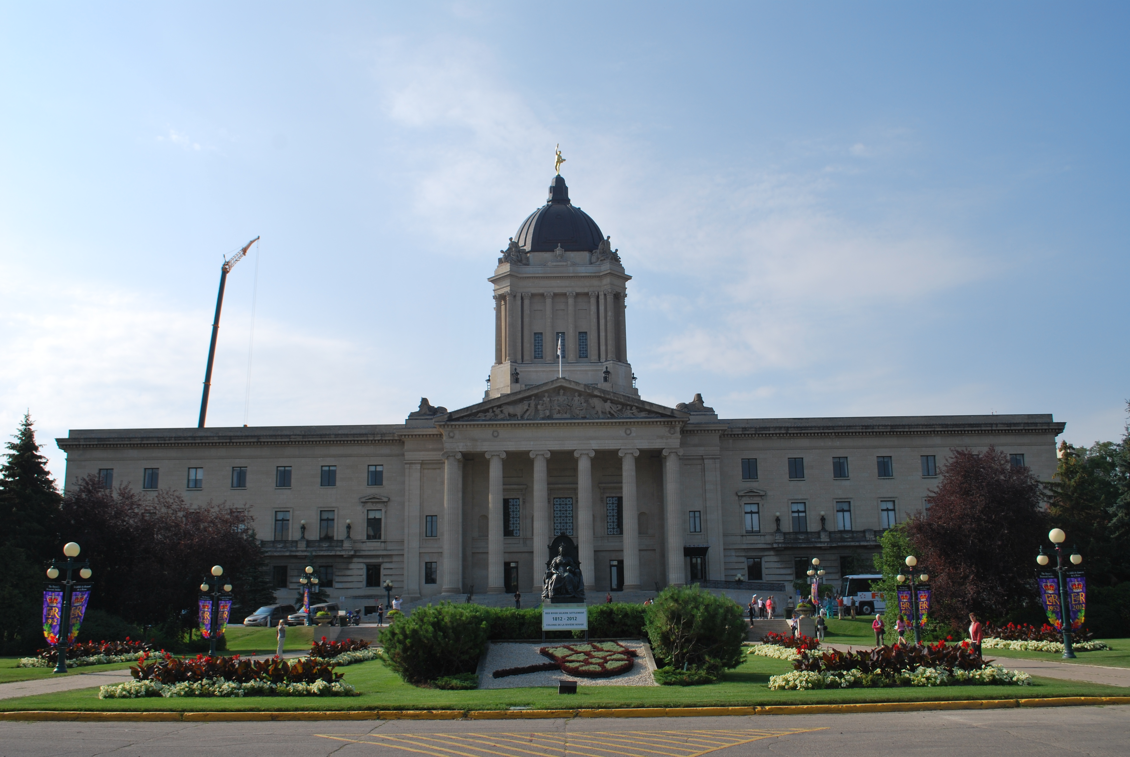 Assemblée législative du Manitoba à Winnipeg, Canada.